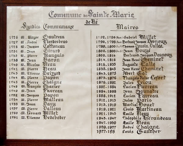 Tableau des maires de Sainte-Marie-de-Ré - île de Ré - Charente-Maritime Photo issue de ma banque d'images : Pep.per 11 octobre 2006 à 10:57 (CEST)